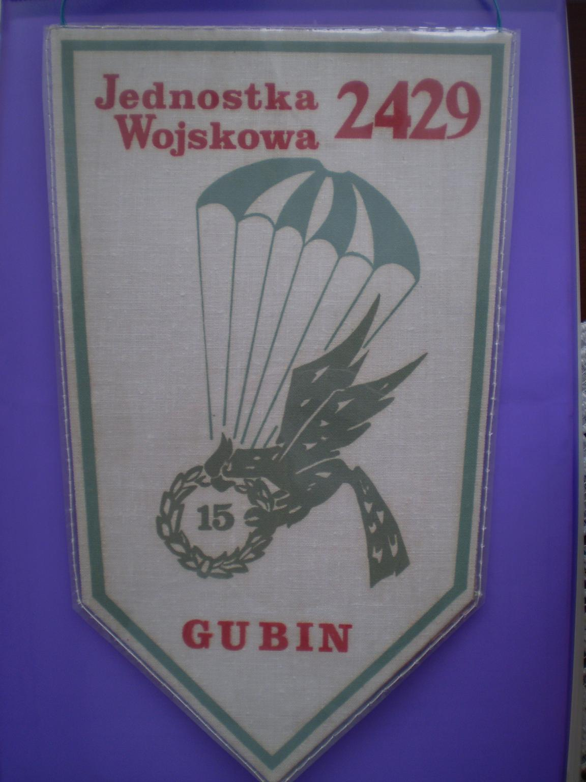 Proporczyk pamiątkowy 2 br z Gubina